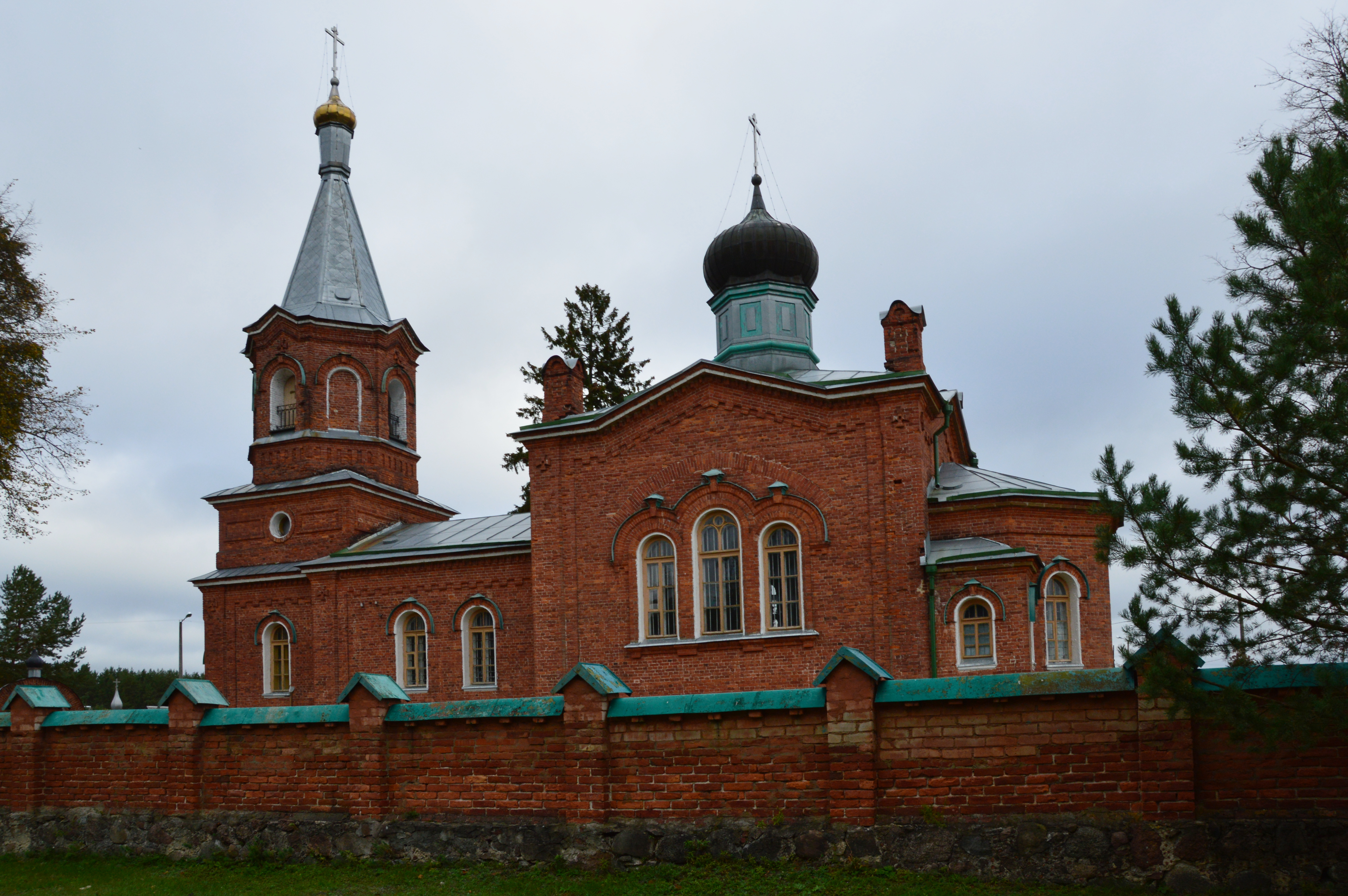 Alajõe Jumalaema Sündimise kirik